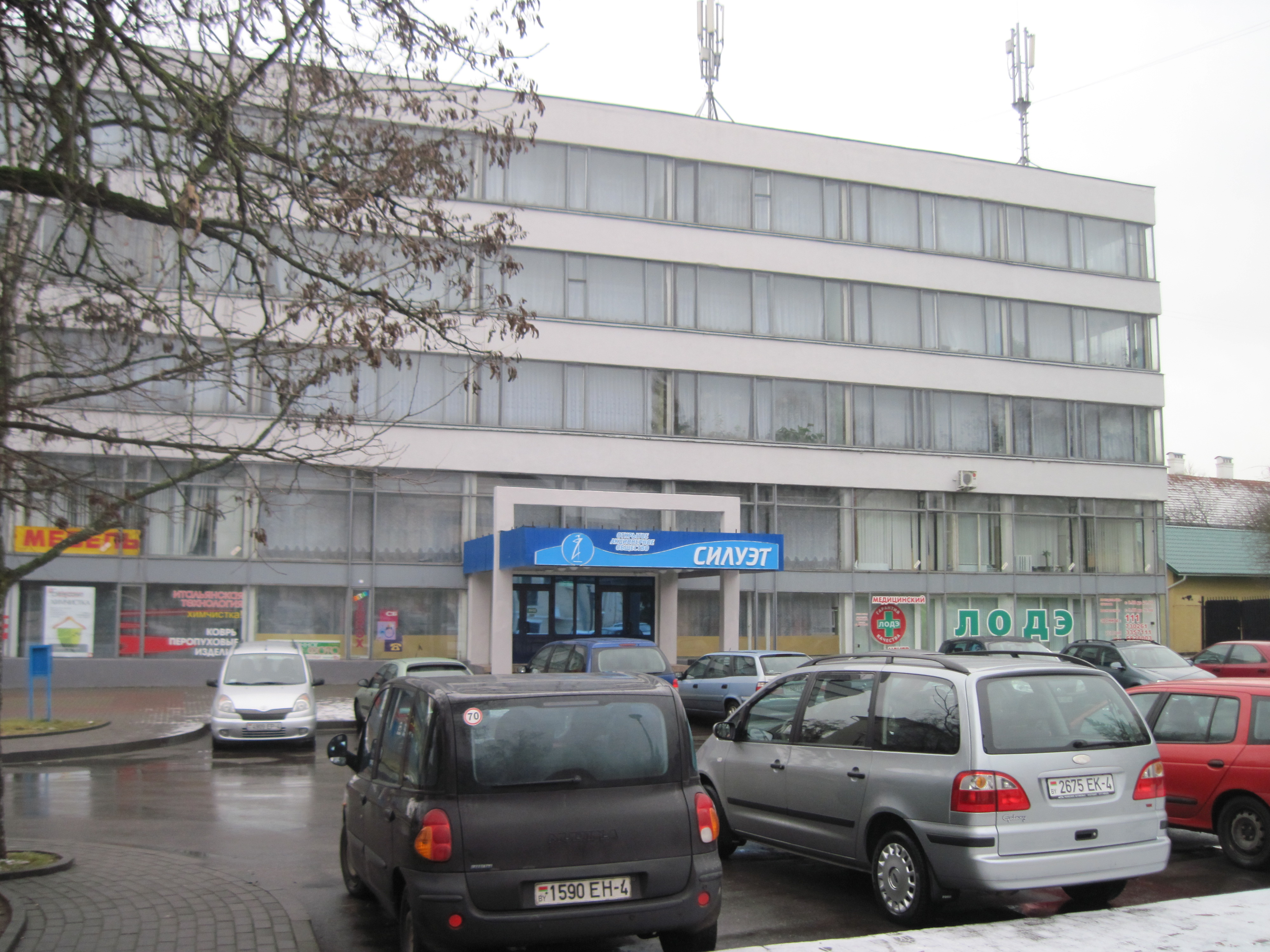 Беларуская (тарашкевіца): Будынак па Замкавай, 4, Гродна